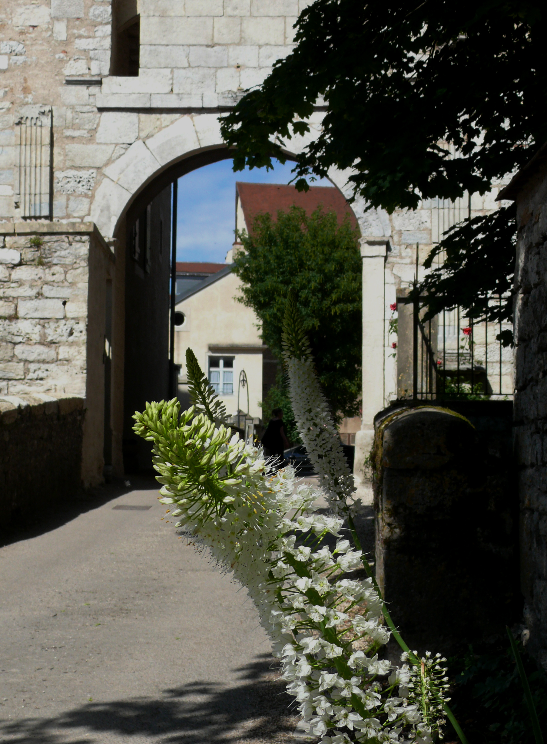 Château de Marnay